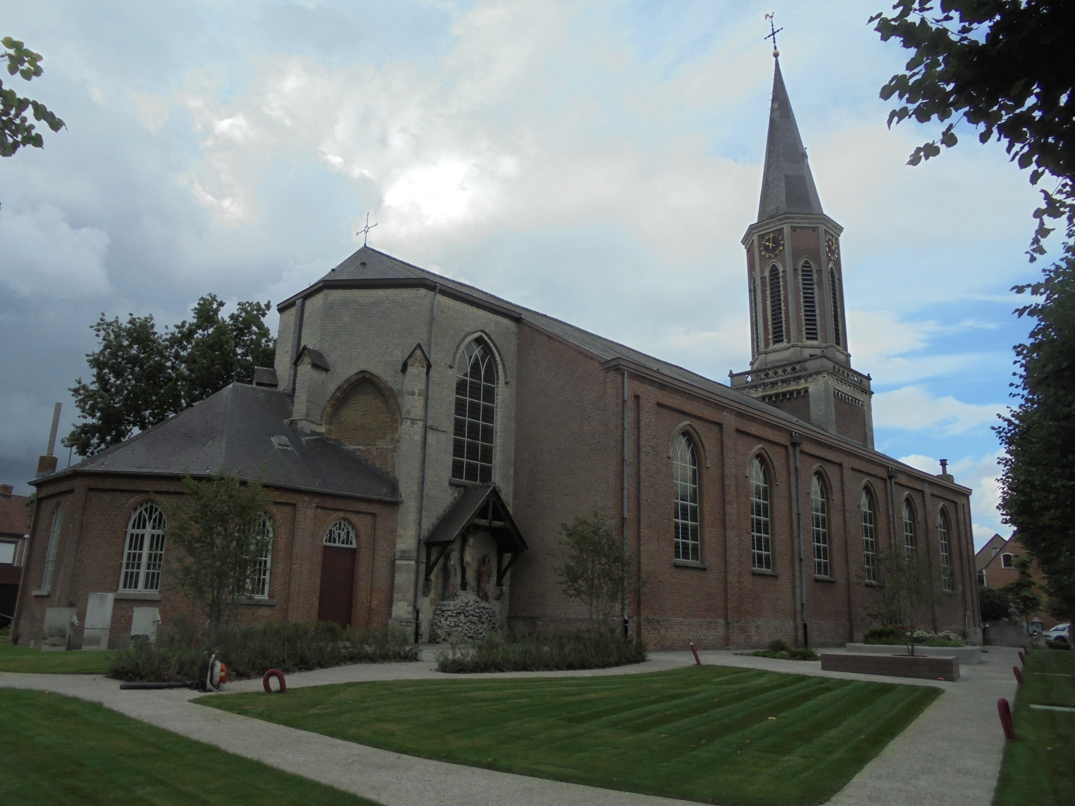 Sint-Jacobskerk - Molenstraat - Kemzeke - Stekene - Oost-Vlaanderen - België